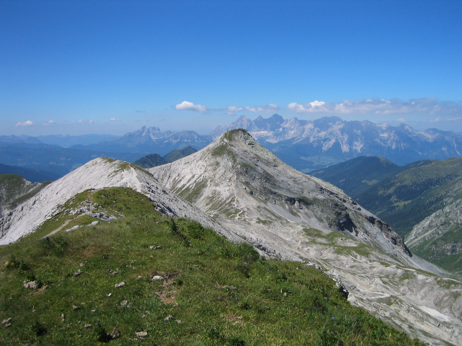 Blick von der Lungauer zur Steirischen Kalkspitze, im Hintergrund das Dachsteingebirge